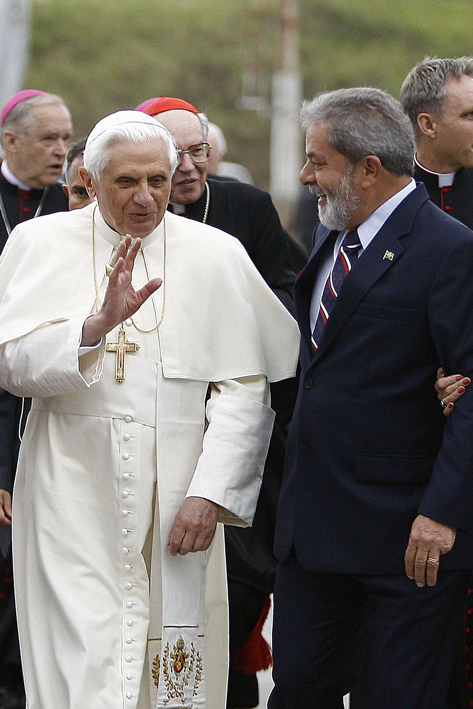 Bento XVI chega a São Paulo e é recebido pelo presidente do Brasil, Luís Inácio Lula da Silva.